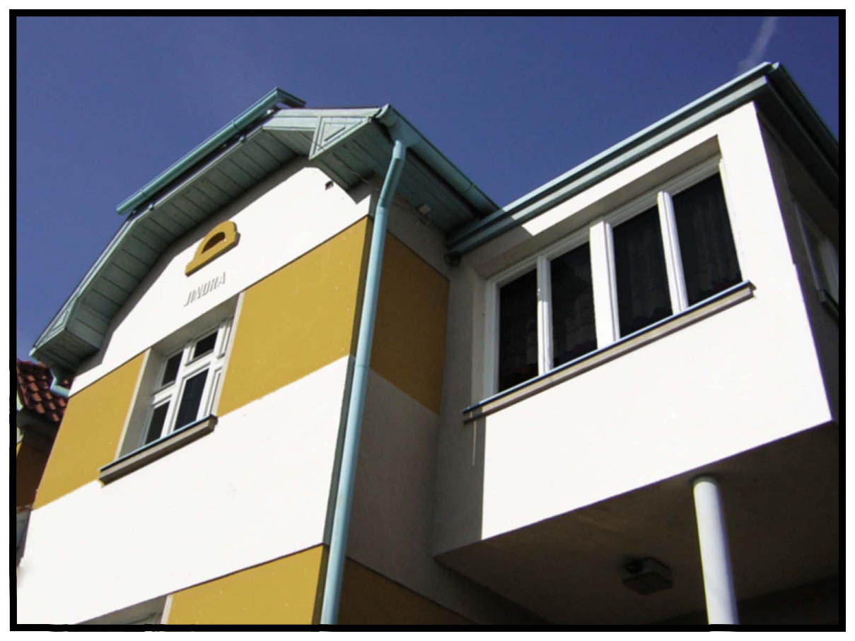 Vila Jindra v Panoším Újezdě - příklad rurálního funkcionalismu